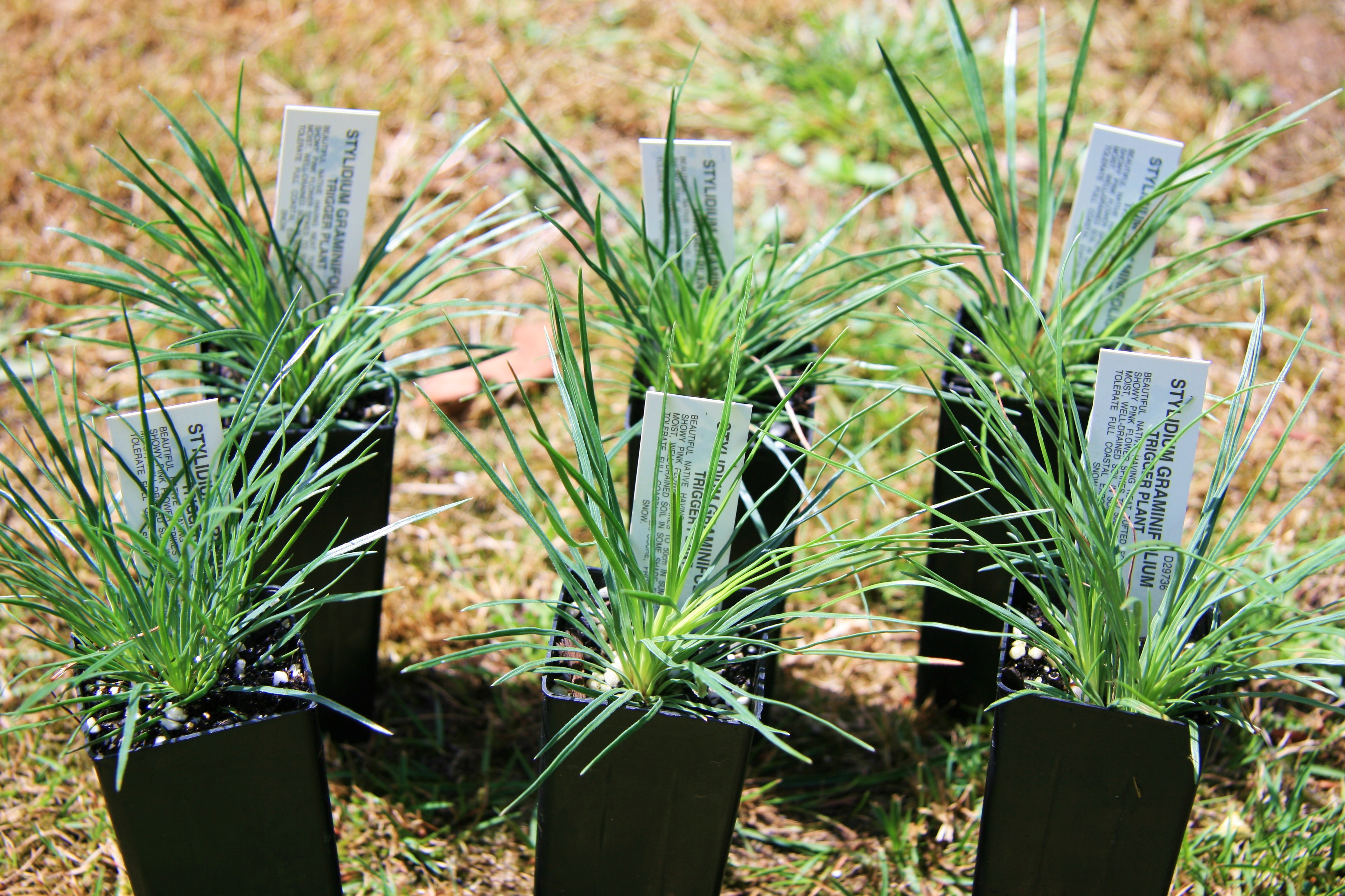 Stylidium graminifolium in cultivation.